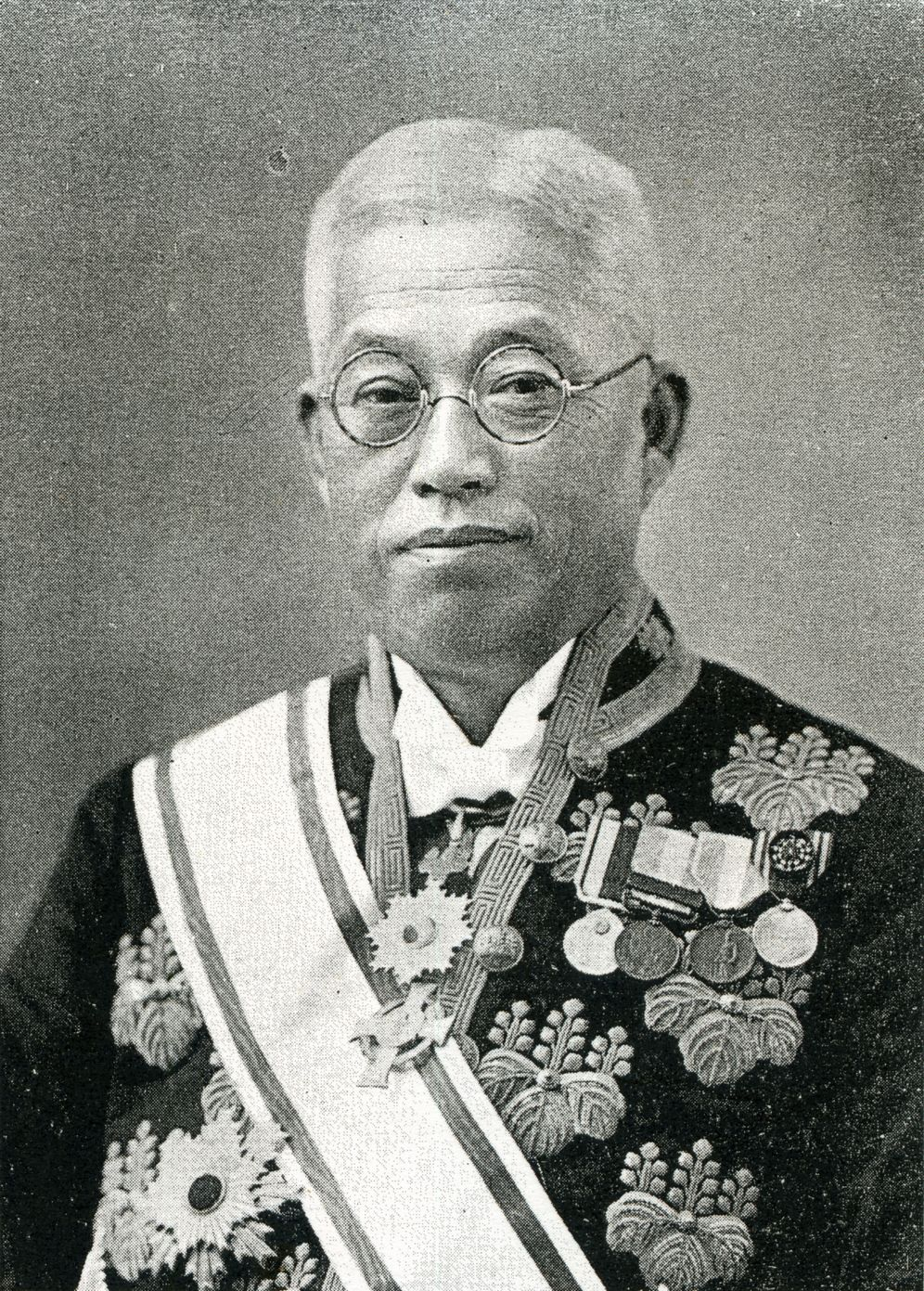 この写真は、小橋一太（1870-1939）の写真です。